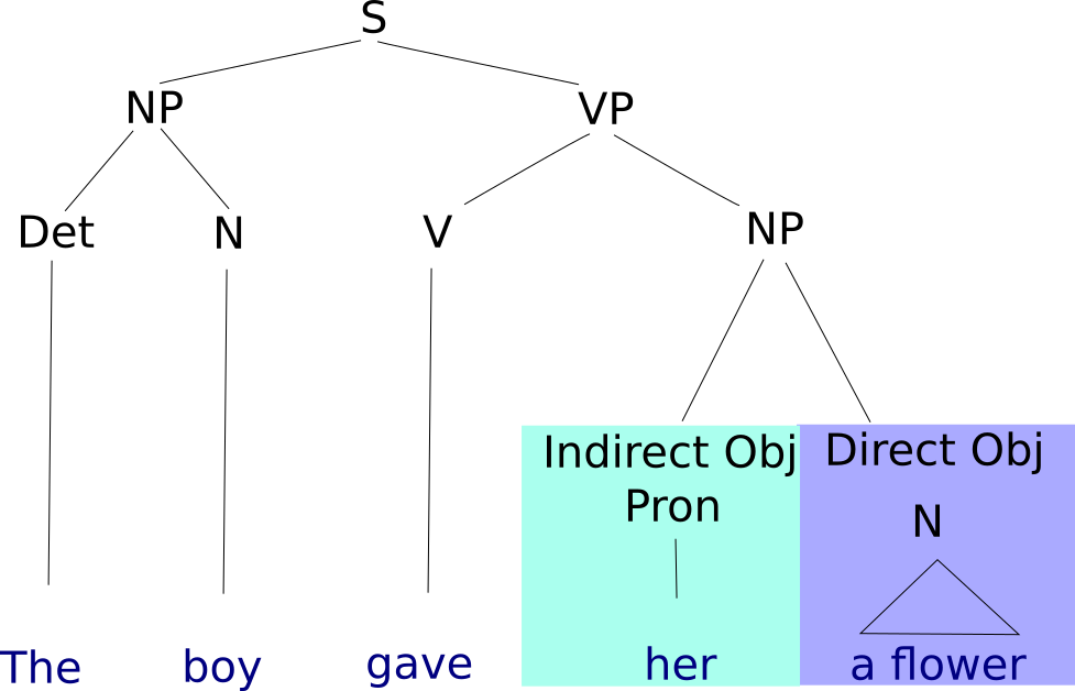 The boy gave her a flower